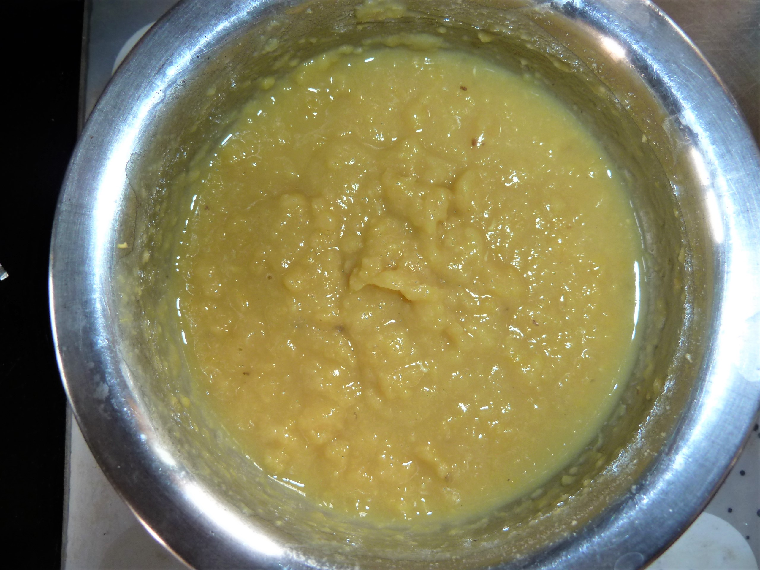 ముద్దపప్పు (కందిపప్పు)